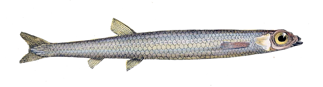 Microstoma microstoma